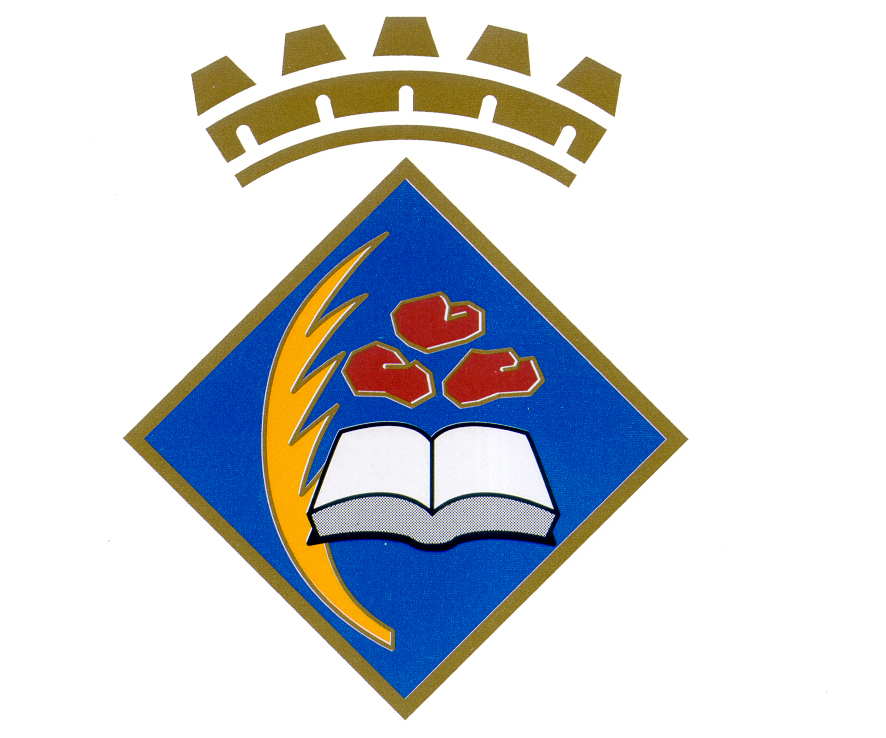 Escut del municipi de Vila-seca (Tarragona).